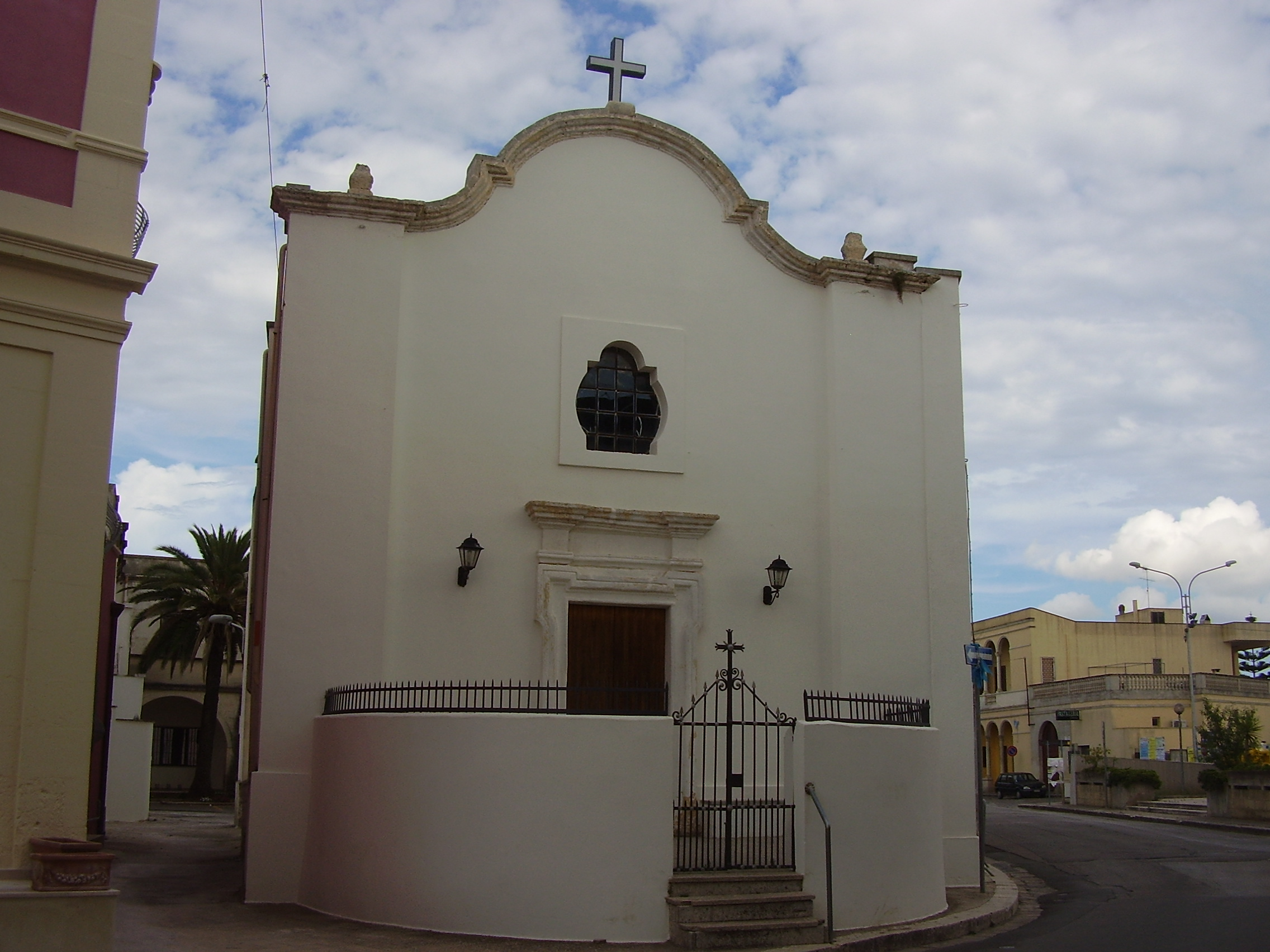 Cappella Immacolata Nociglia